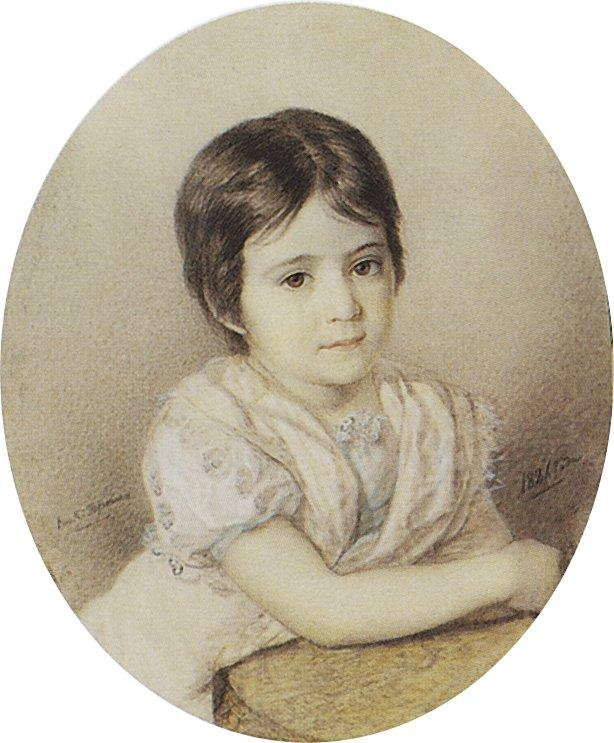 Portrait of Maria Pavlovna Volkonskaia (1816-1854)